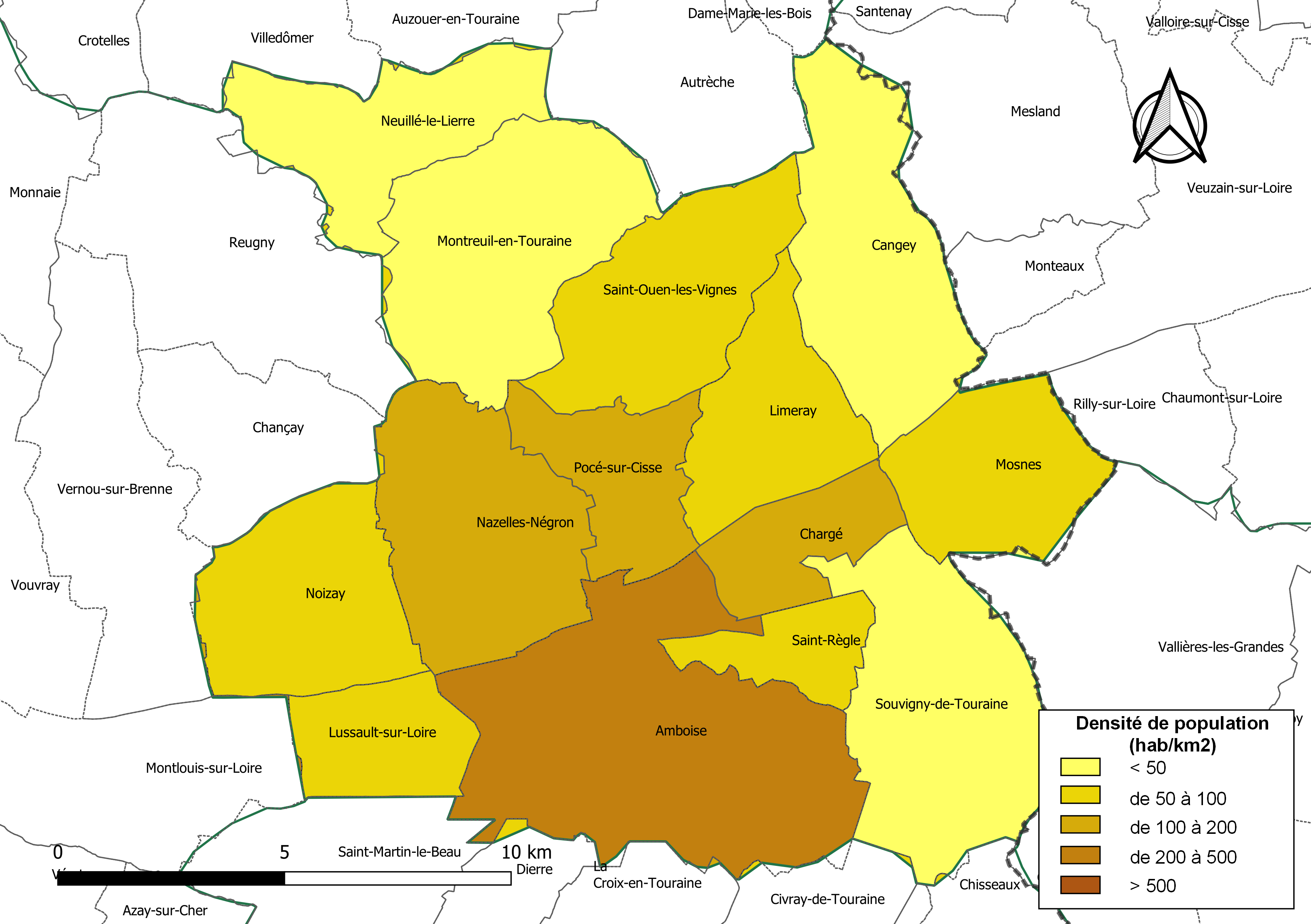 Carte des densités de population (millésimée 2016) des communes de la communauté de communes la Communauté de communes du Val d'Amboise, département d'Indre-et-Loire, France. Composition au 1er janvier 2019.